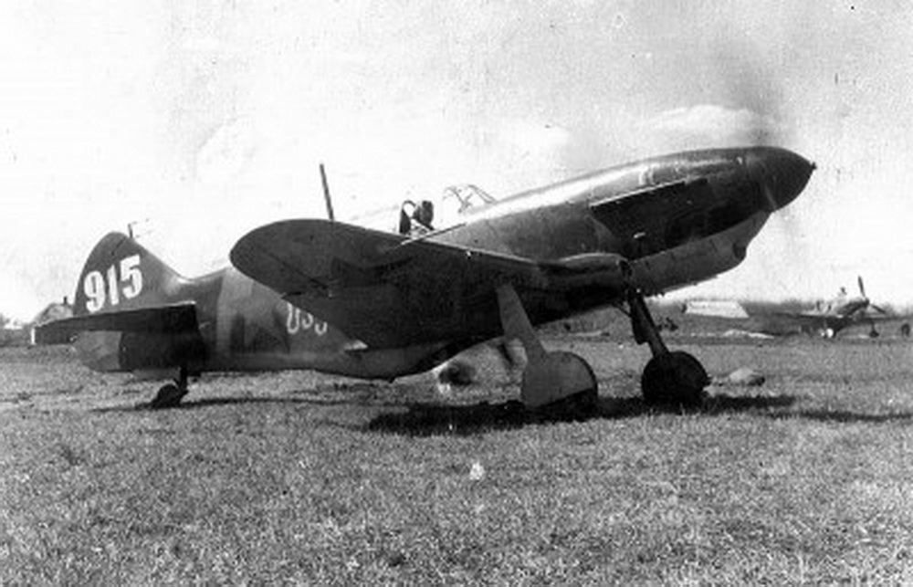 LaGG-3 66. série patriaci 88. stíhaciemu leteckému pluku, fotografovaný na severnom Kaukaze. Na trupe lietadla je nápis v gruzínčine: საბჭოთა საქართველო (Sabčota Sakartvelo; v preklade: „Sovietske Gruzínsko“)